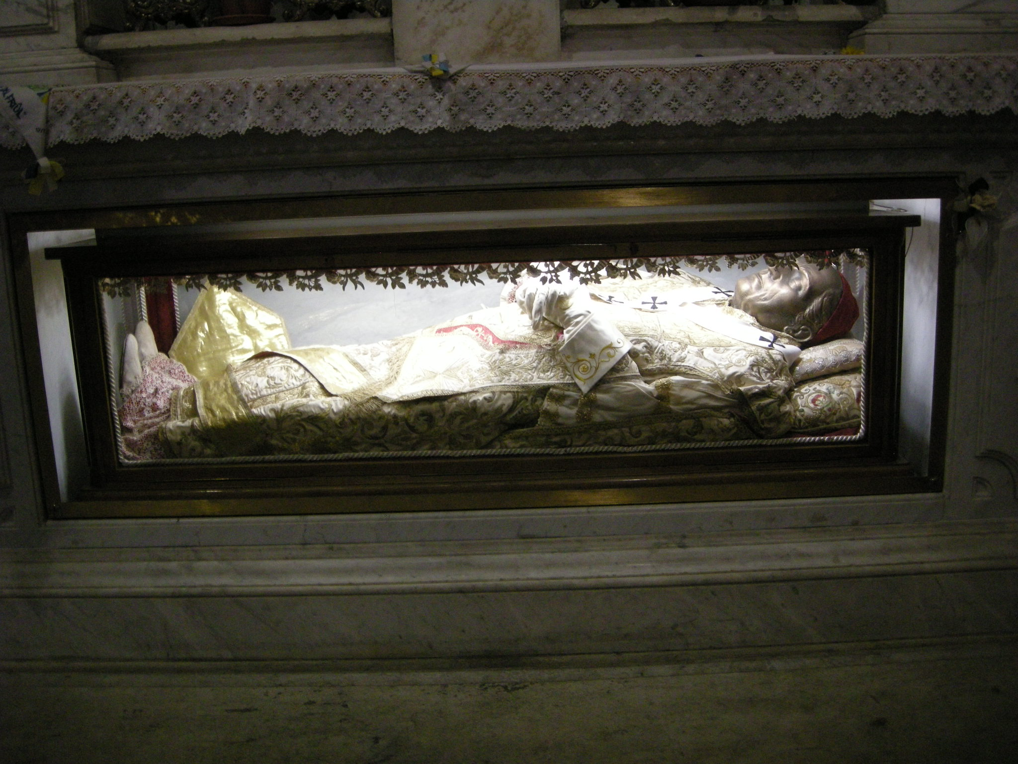 Duomo di udine, beato bertrando vescovo